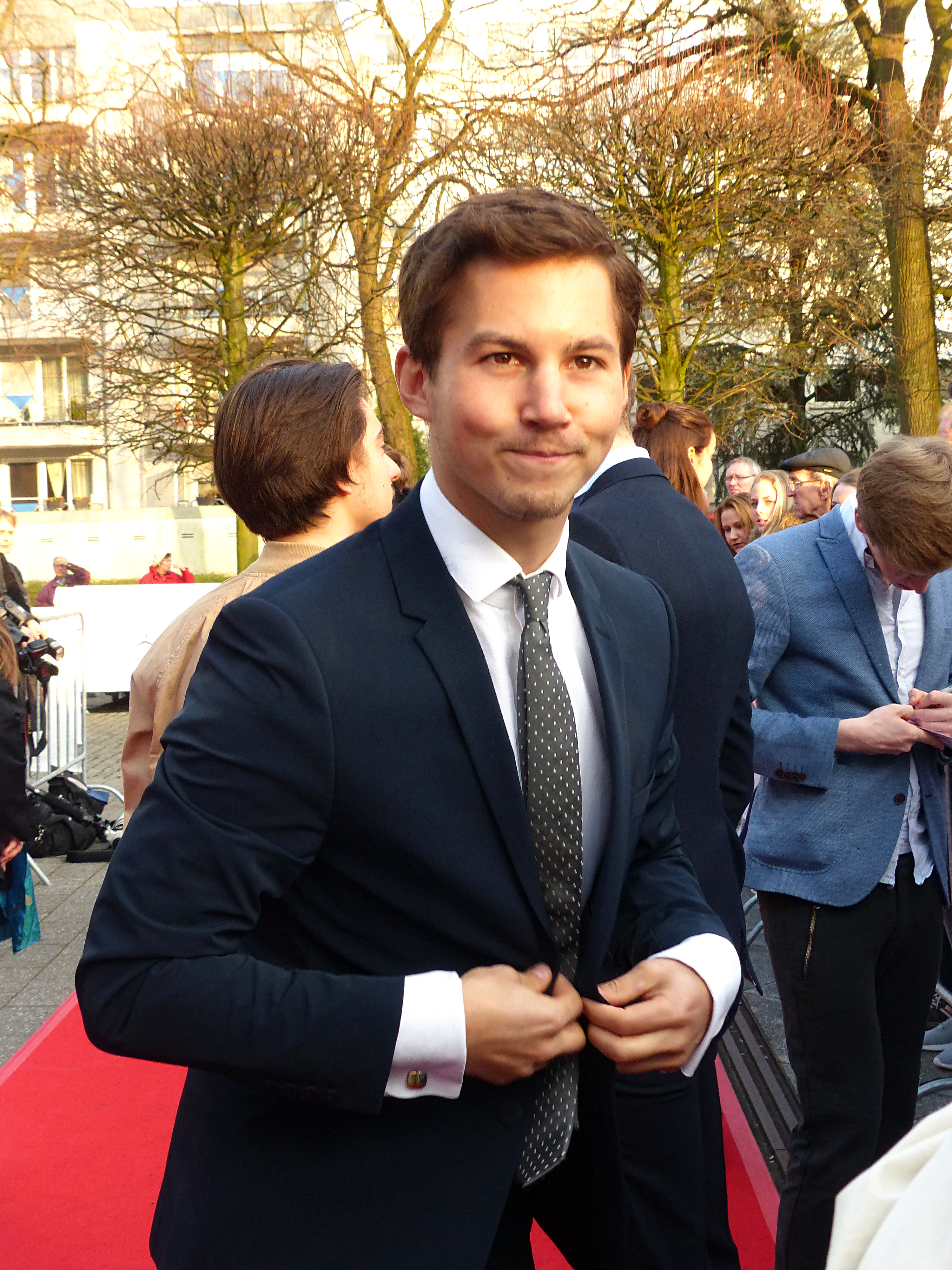 Tim Oliver Schultz bei der Verleihung des 'Grimme Preis 2016' am 08.04.2016 in Marl.